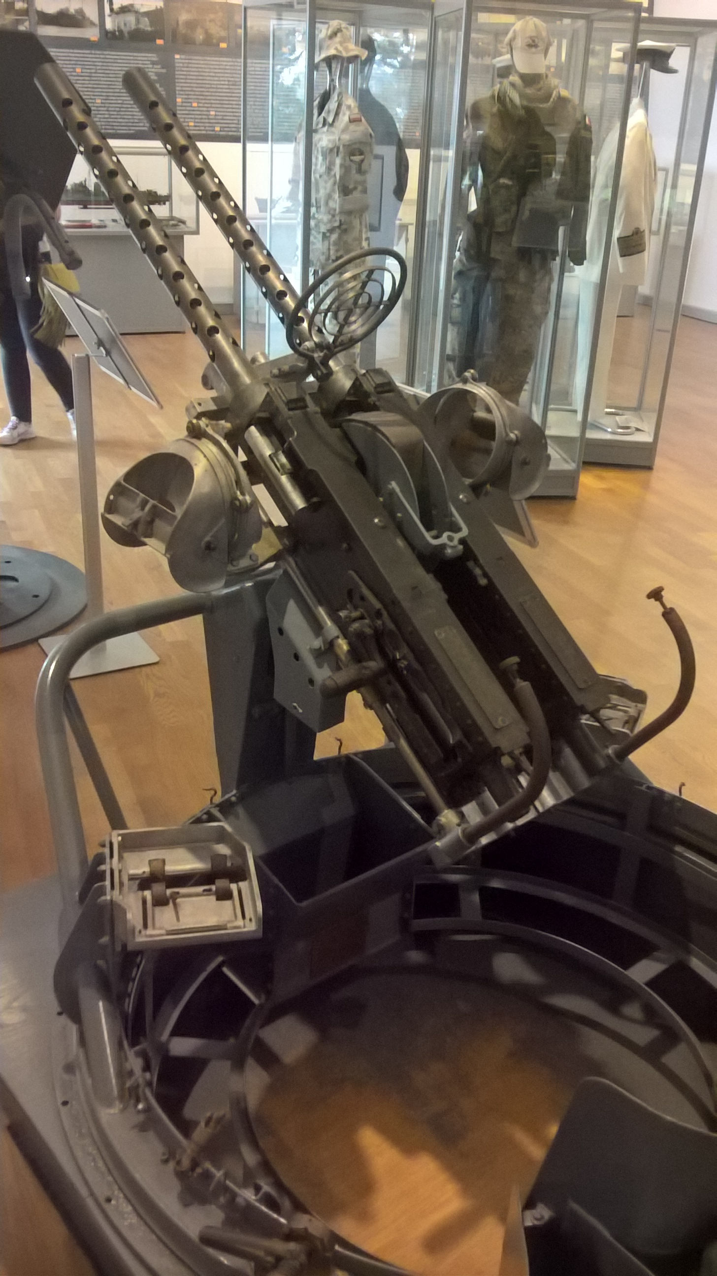 Wielkokalibrowy karabin maszynowy Colt-Browning M2 kal. 12,7 mm pochodzący ze ścigacza ORP "Błyskawiczny", eksponowany w Muzeum Marynarki Wojennej w Gdyni.